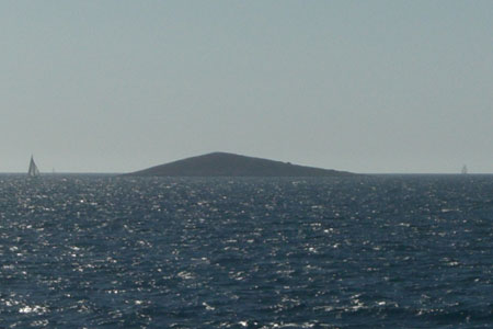 island of Lukovnjak, seen from Primošten, Croatia